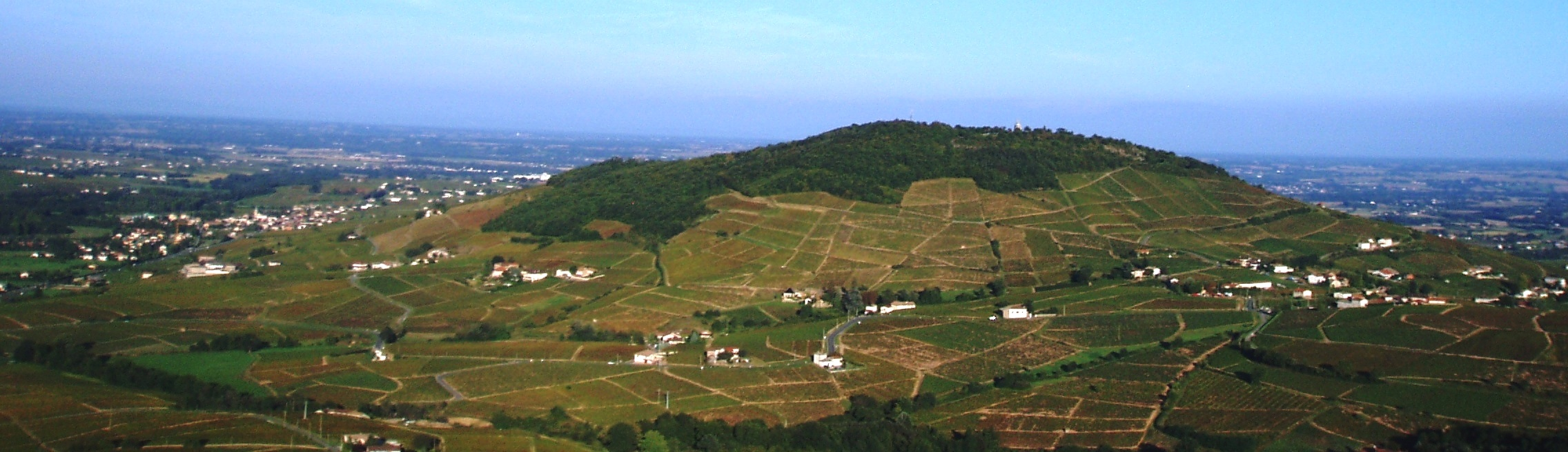 Le mont brouilly, vu de quincié-en-beaujolais (vue aérienne).